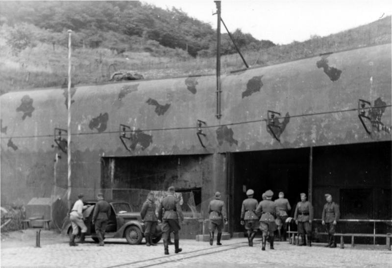 Westwall, Maginot-Linie, Besichtigung eines Werkes